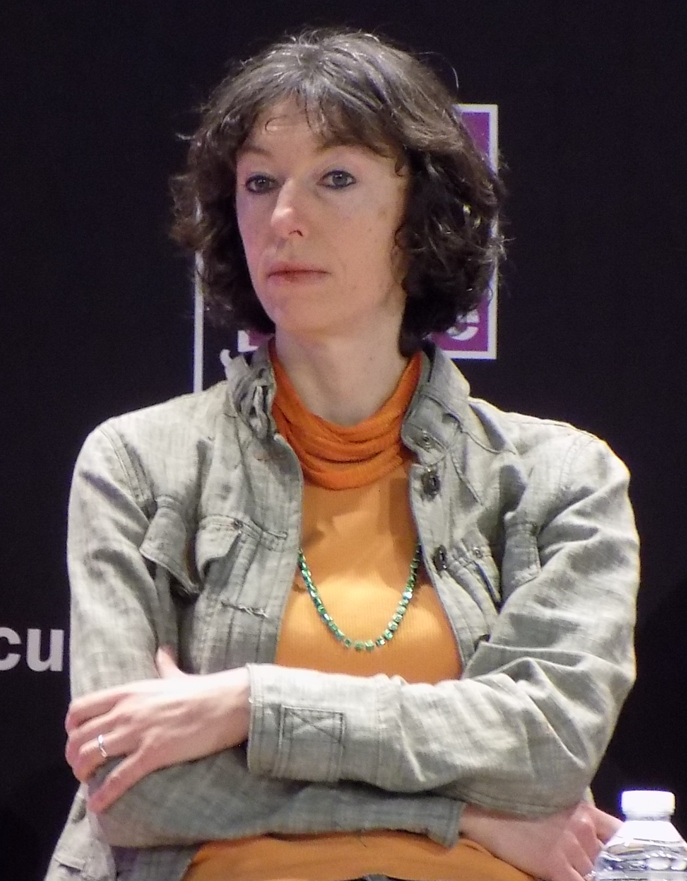 Élisa Brune lors du forum « L’année vue par les sciences » organisé par France Culture le 13 février 2016